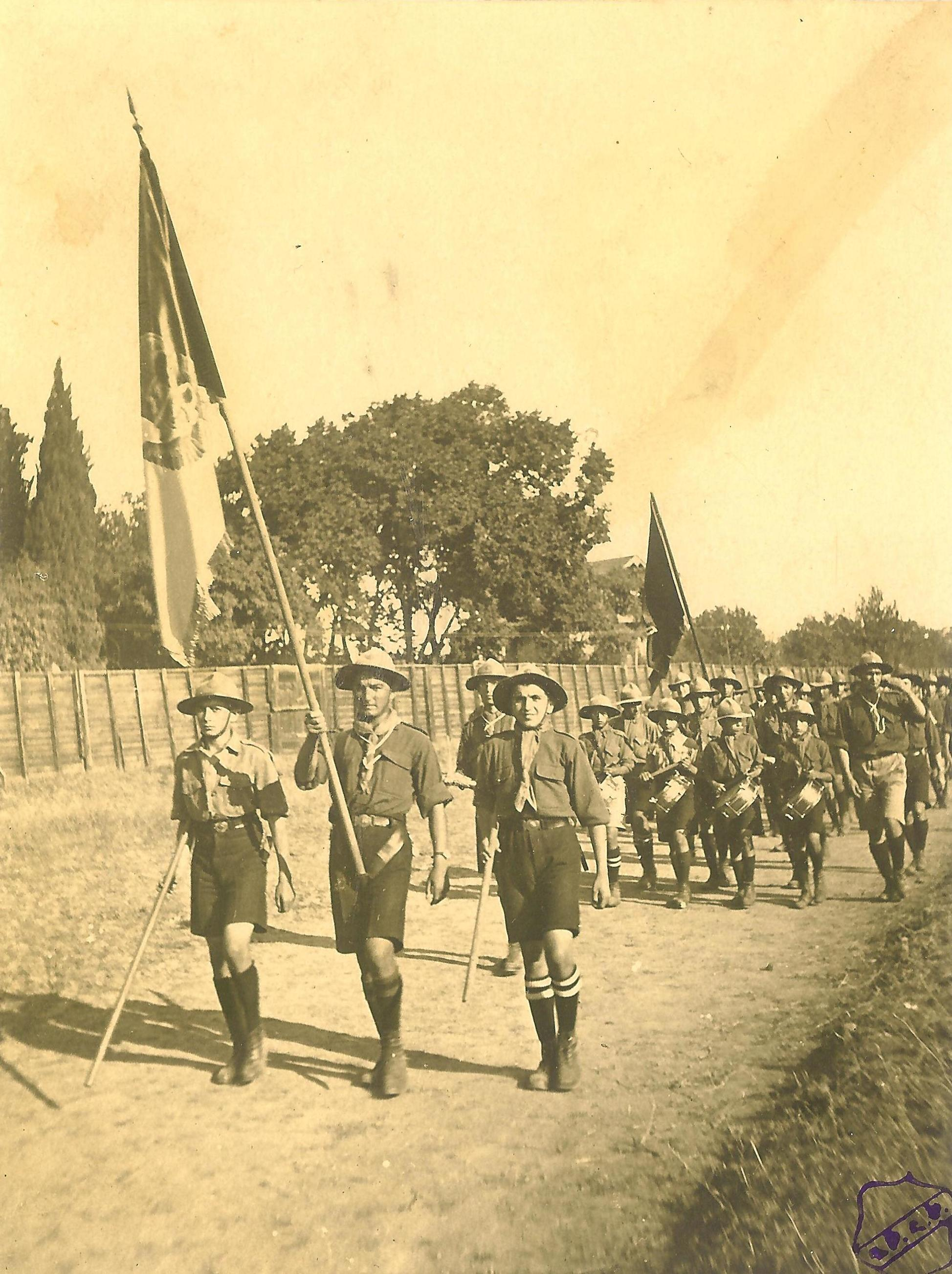 Premier défilé des scouts arméniens à Constantinople (1918). Le porte drapeau est Vazken Andréassian, agé de 15 ans.